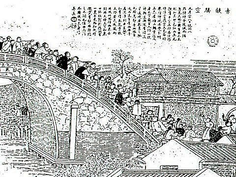 中國清代畫家吳有如晚年的作品〈赤焰騰空〉